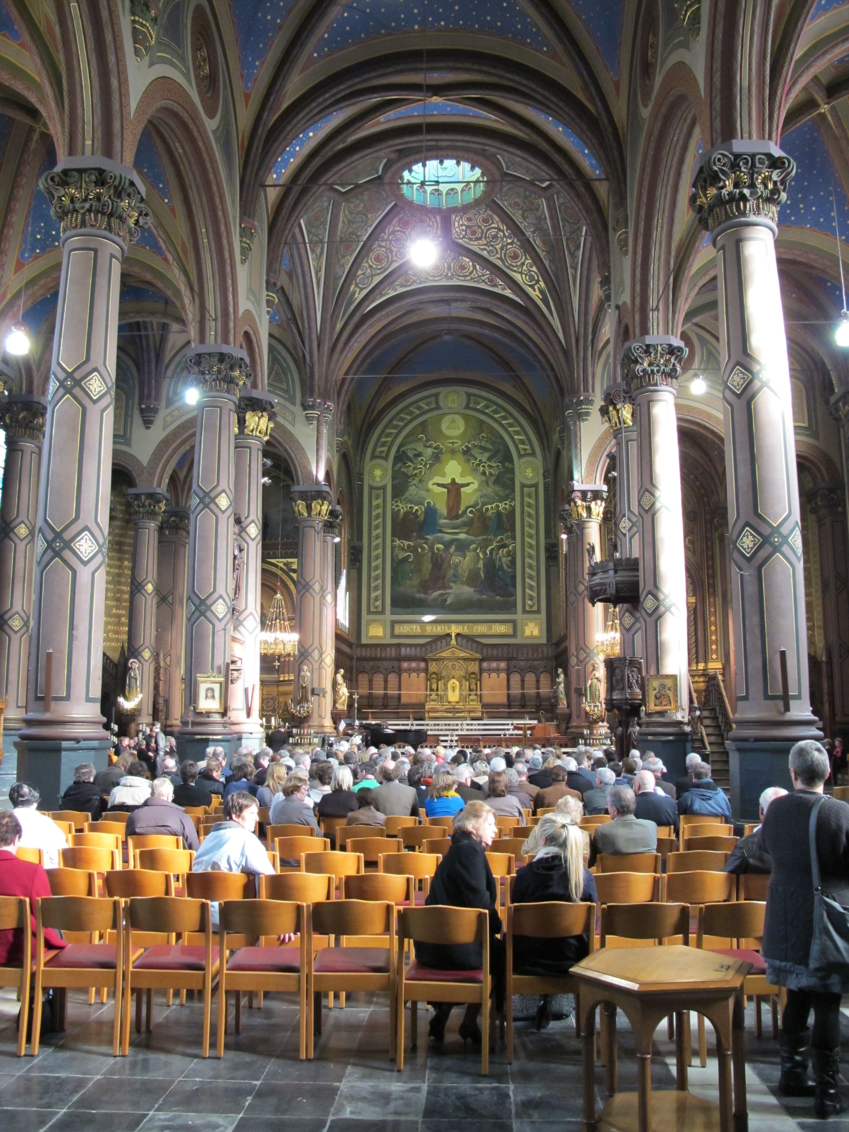 Parochiekerk Onze-Lieve-Vrouw Bijstand der Christenen te Sint-Niklaas: interieur.